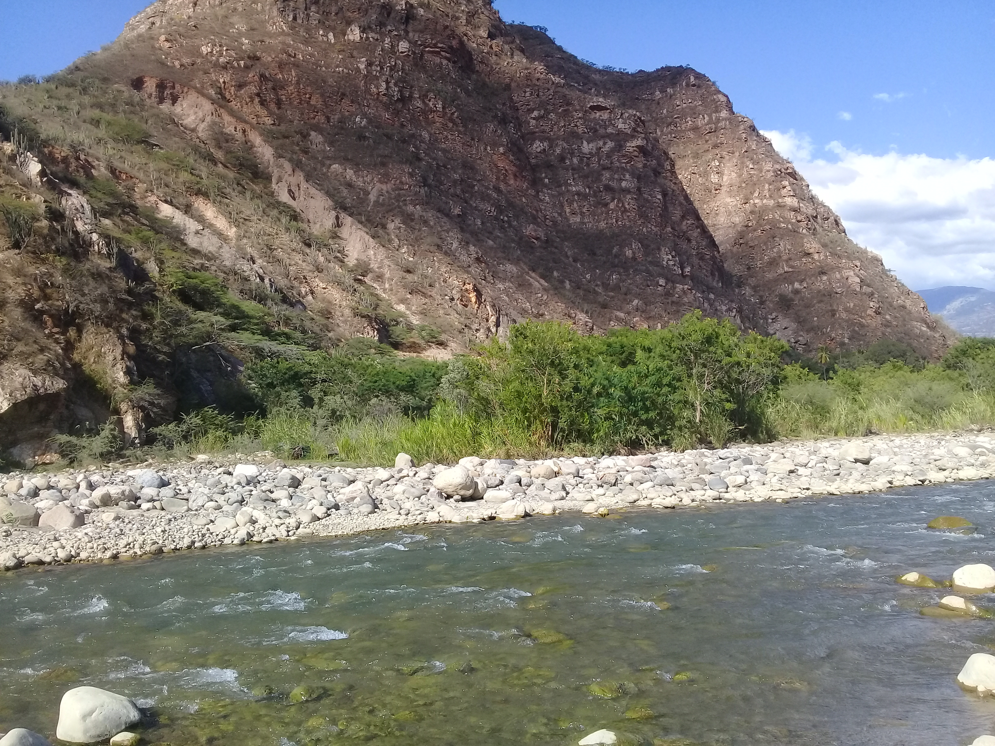 Fuente Hídrica que baña la vereda de vera. Desemboca en el Río Chicamocha.